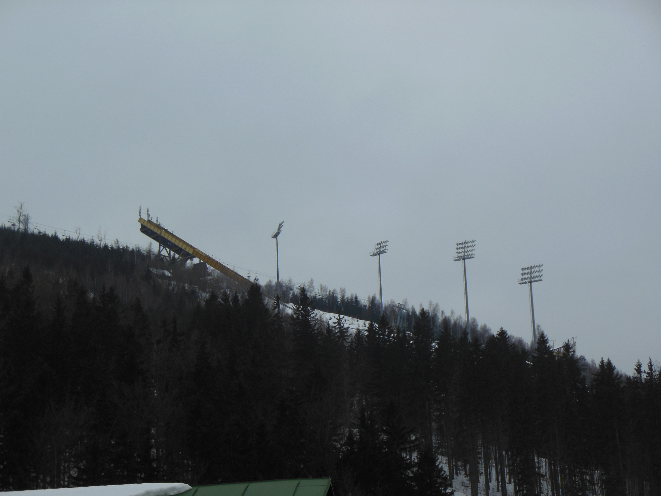 Čertova hora na okraji Harrachova (okres Semily). Skokanské můstky.